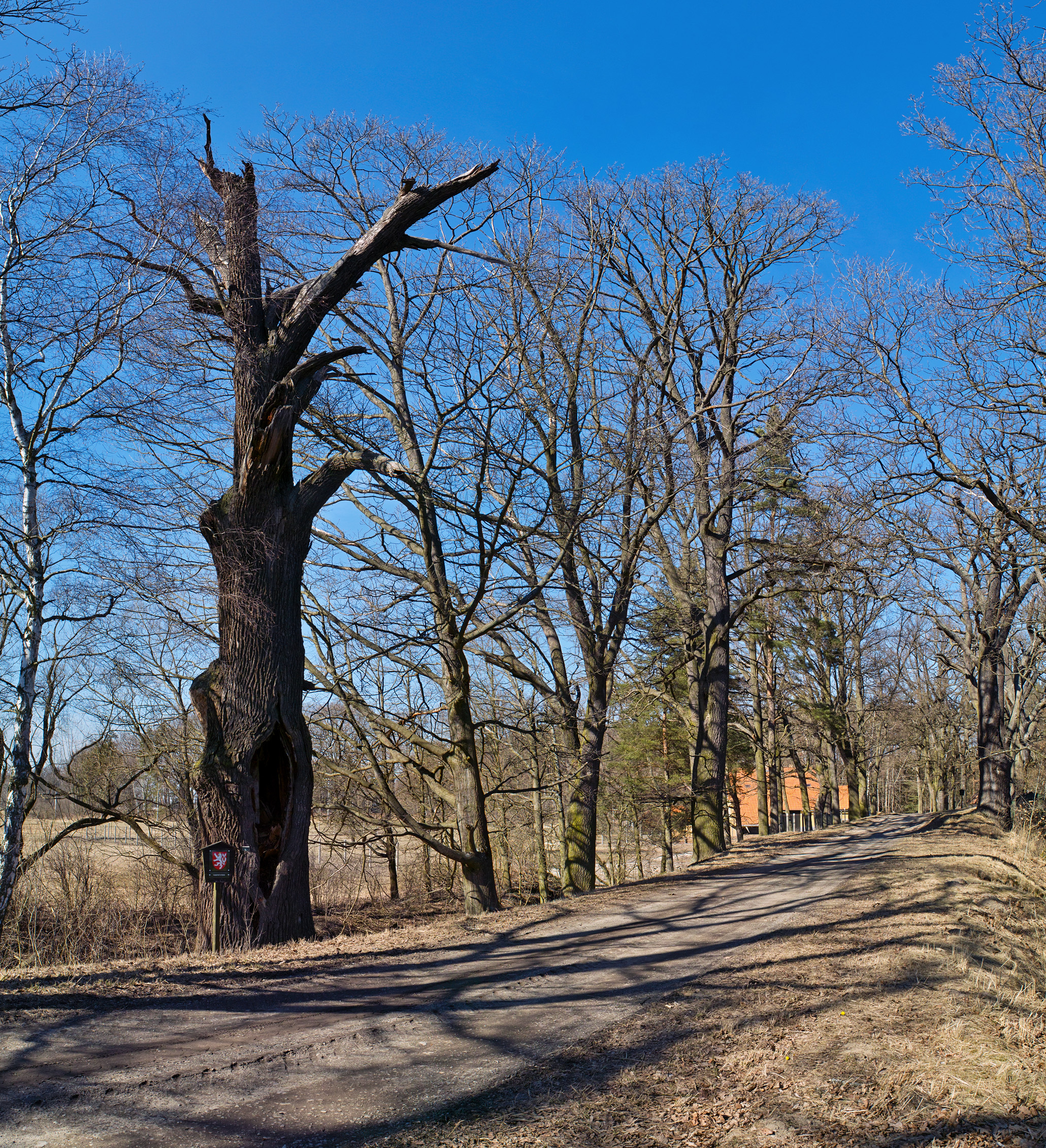 Hráz rybníka Nový Vdovec, památný dub (torzo)